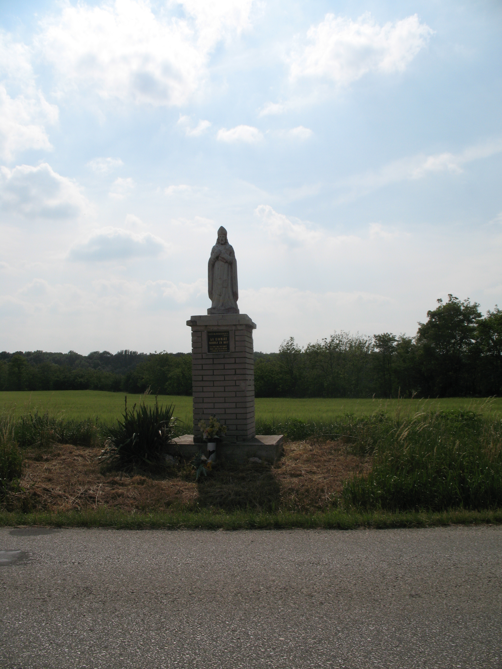 Szent Donát szobra Felsőszőlősön, 2008-ban egy viharban megsérült és renoválták